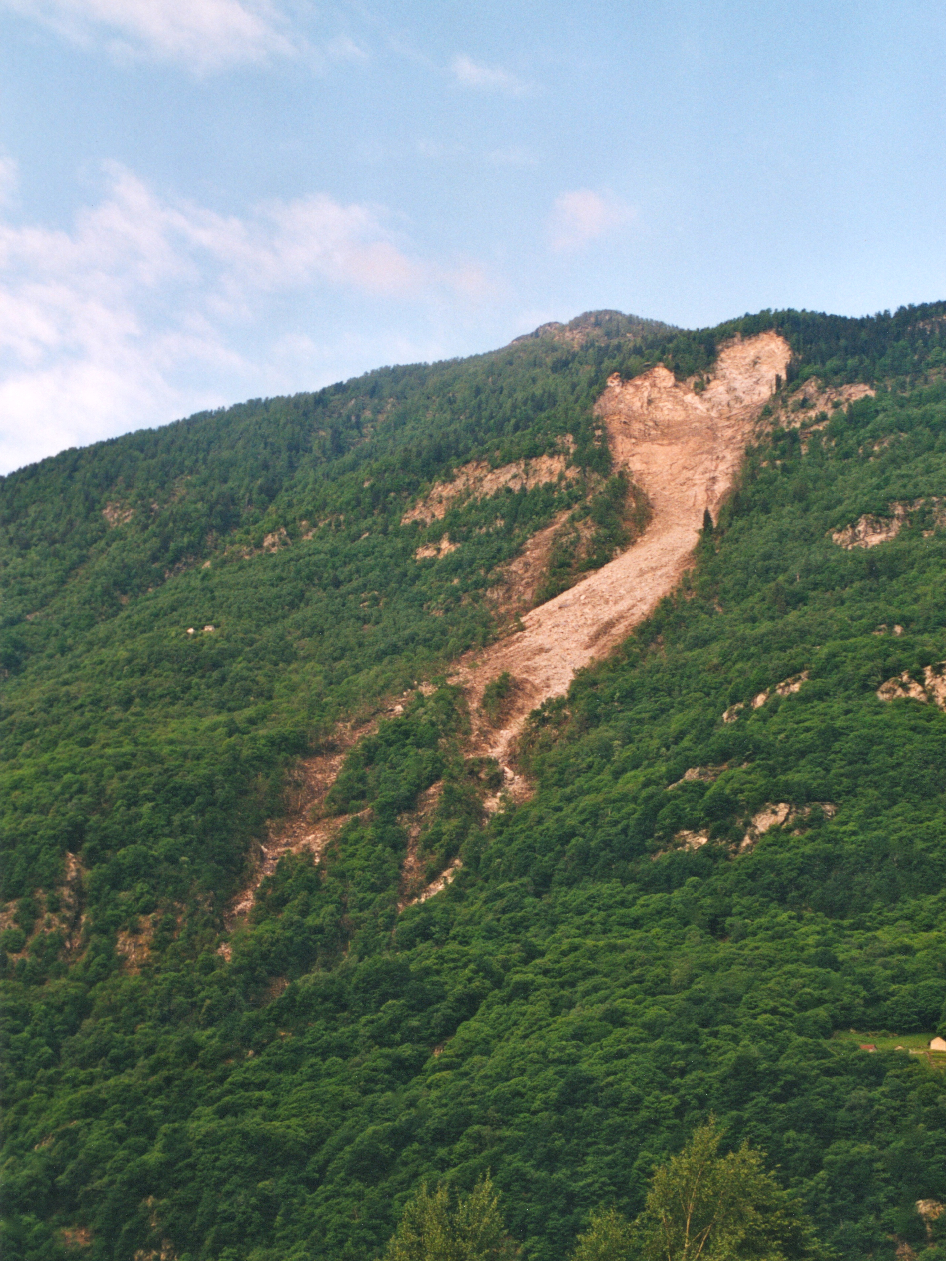 La frana del Valegion dopo la caduta di 150 000 mc di materiale.